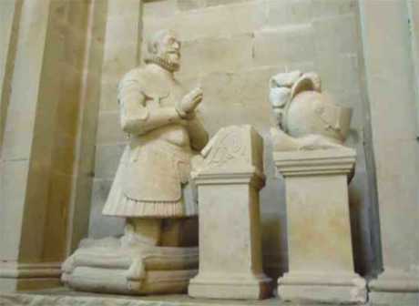 1247 1.Escultura ; Estatua de D. Alonso de Camino